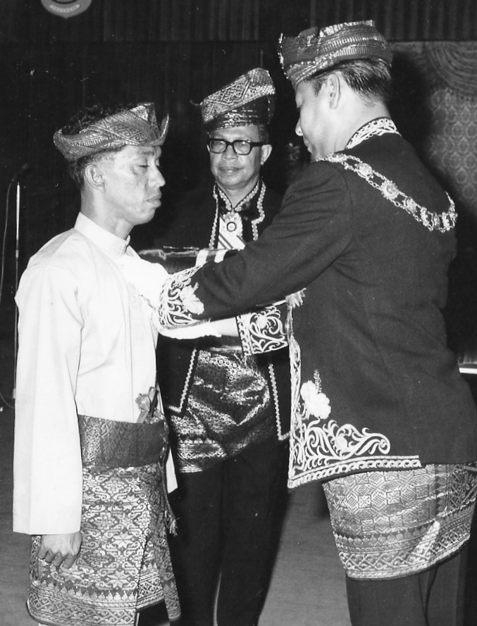 Yang di-Pertuan Agong menganugerahkan Yang Berhormat Dato' Sulong bin Mahmood sebuah pingat.